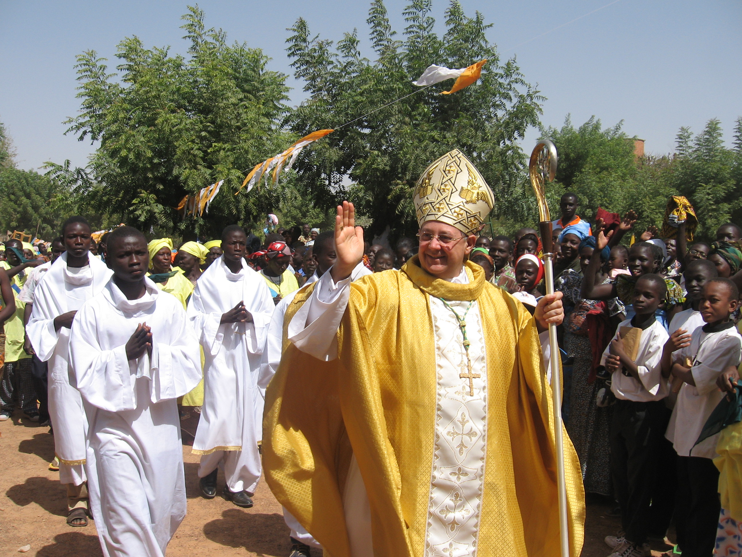 FOTO CHE RITRAE MONS. VITO RALLO, IMMAGINE DI PROPRIETA' DEL DIRETTO INTERESSATO. ACCOLGLIENZA A KOUPELA!